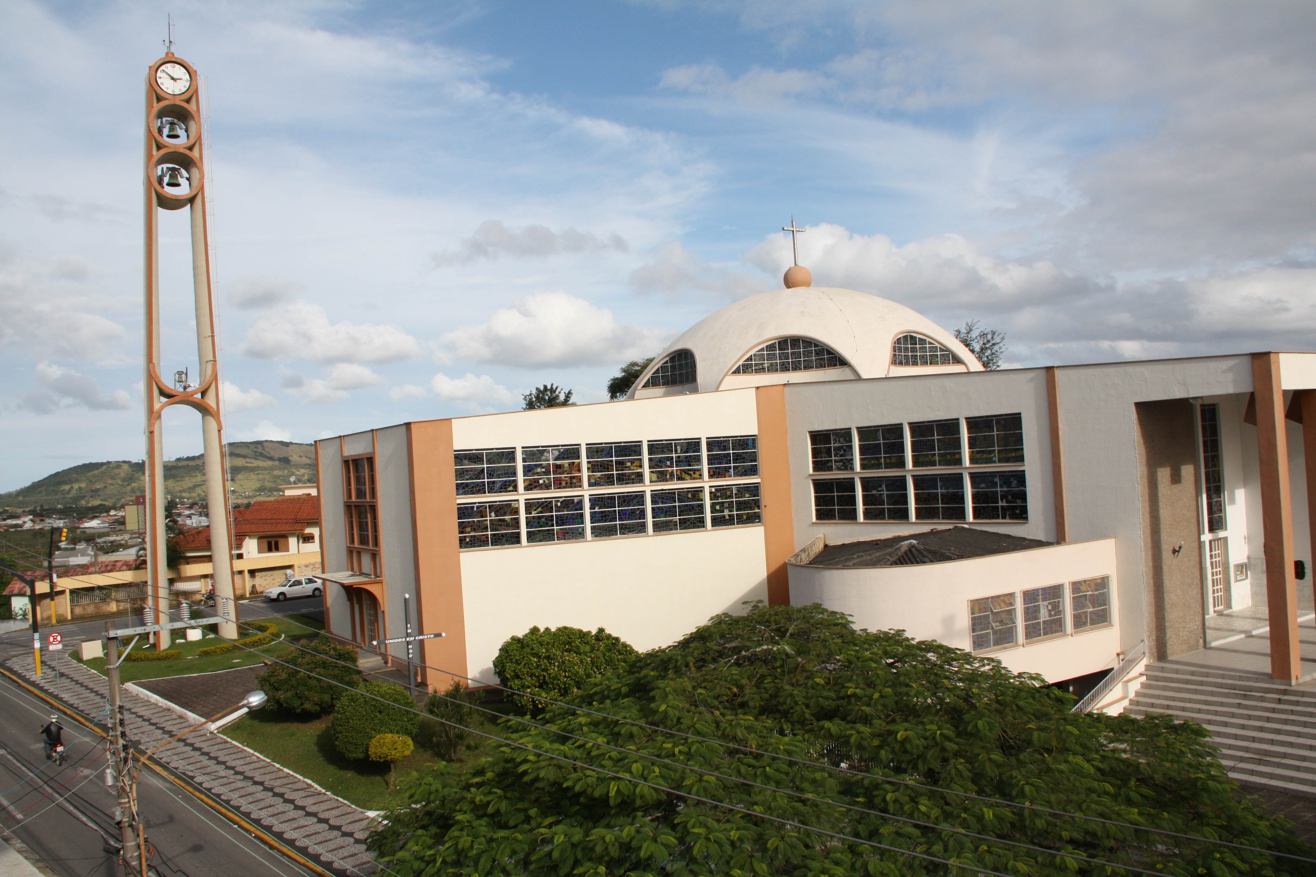 Catedral Diocesana Tubarão SC